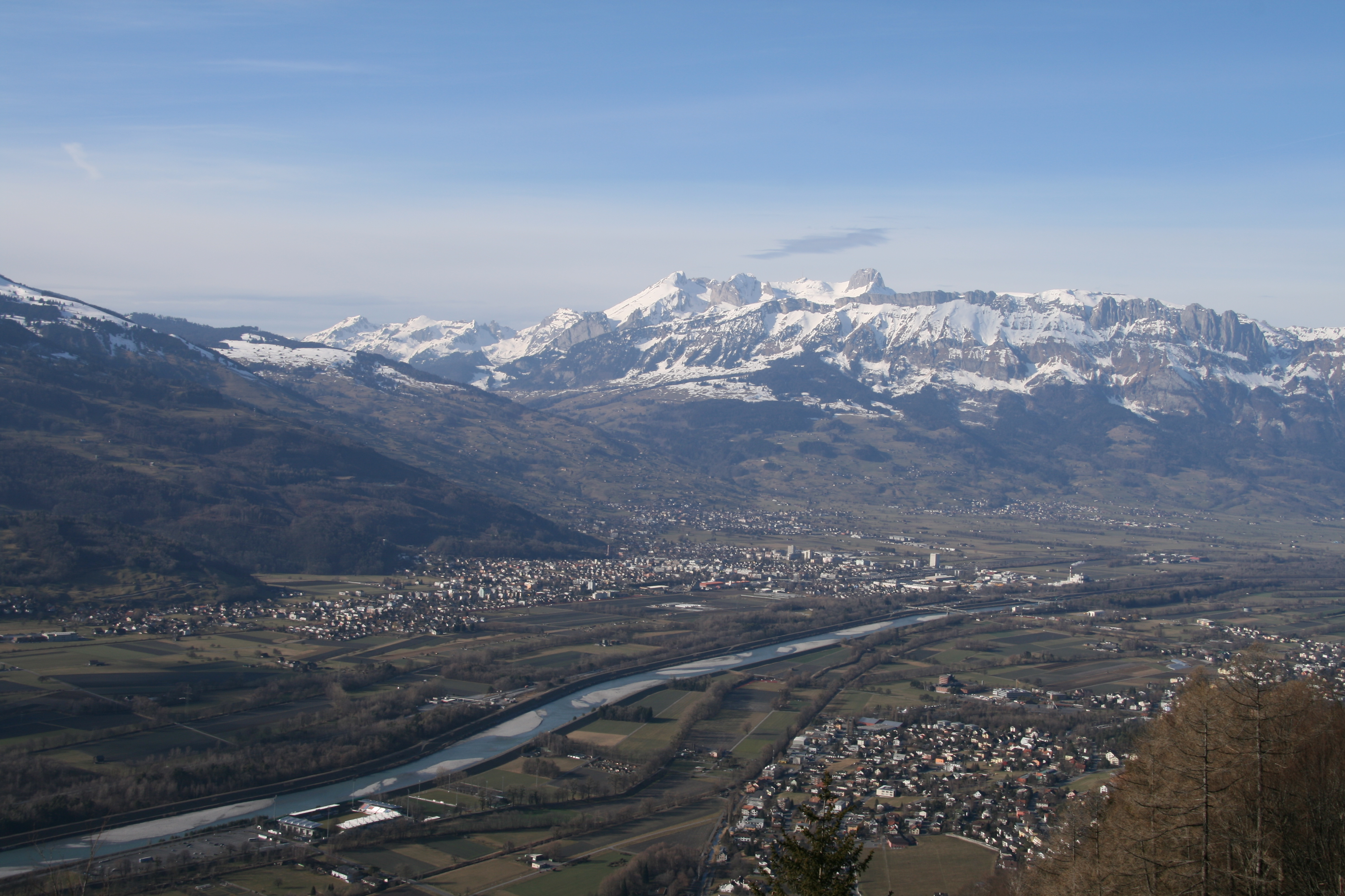 Blick von Triesenberg talwärts auf rechts die Gemeinde Schaan in Liechtenstein über den Alpenrhein hinüber auf die Gemeinden Buchs SG, Grabs und Gams SG auf die noch schneebedeckten Berge des Alpsteines.